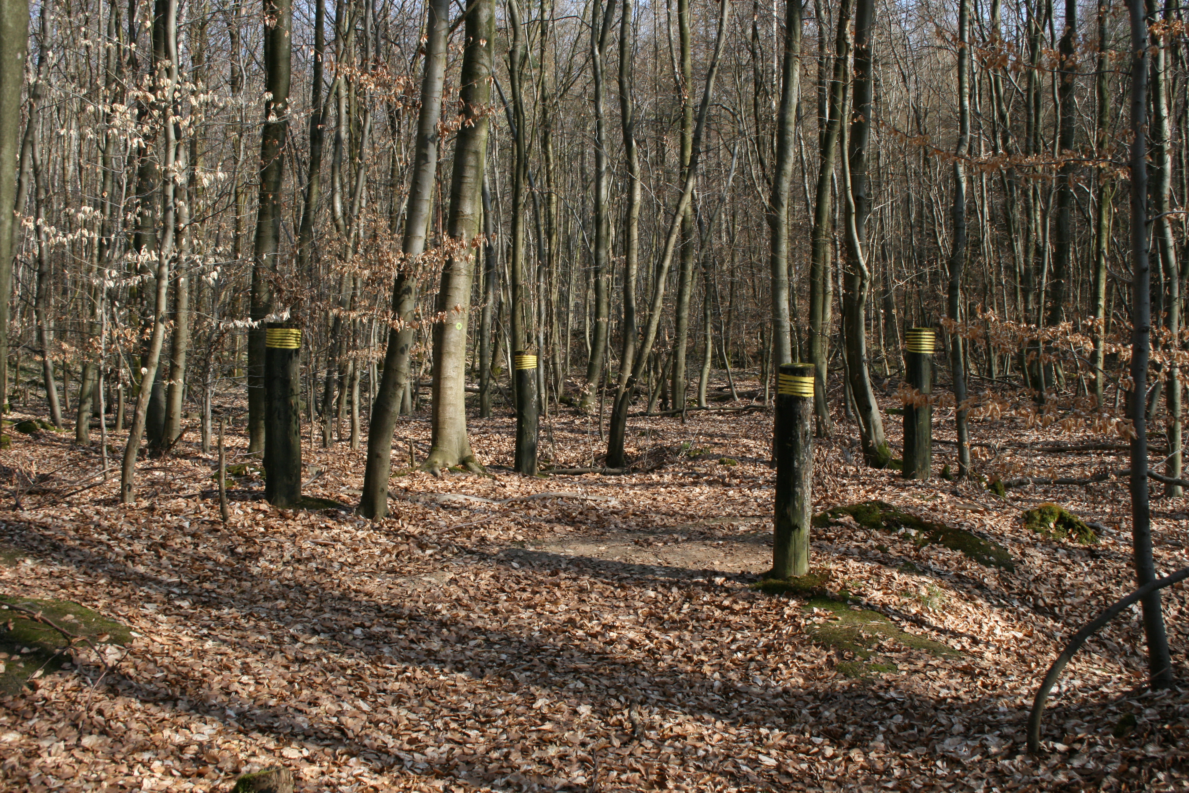 Wachposten 4/103 im Eckartshäuser Unterwald am Wetteraulimes. Holzpfosten verdeutlichen den Standort des Holzturms.